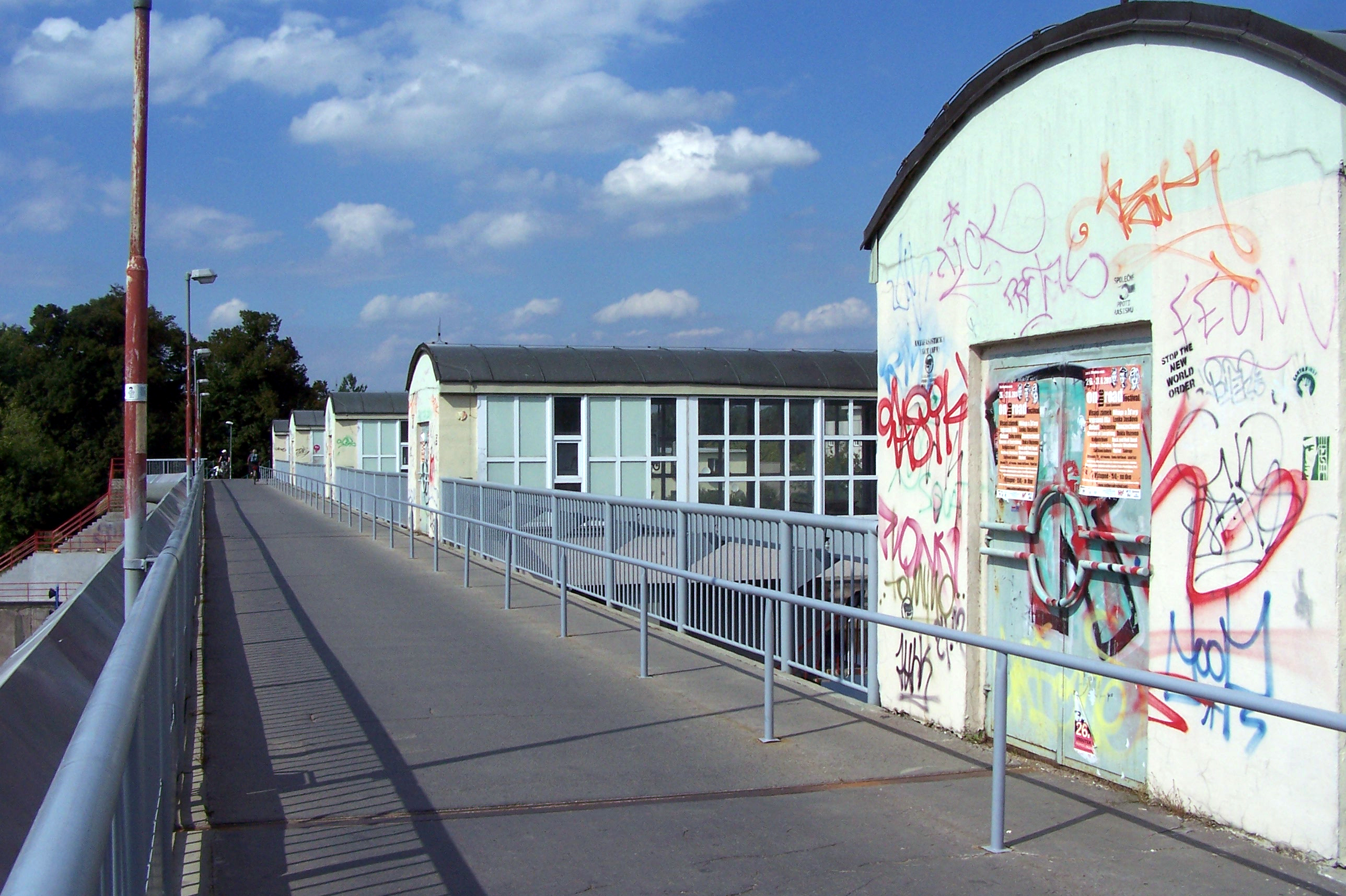 Zdymadlo v Pardubicích – lávka pro pěší